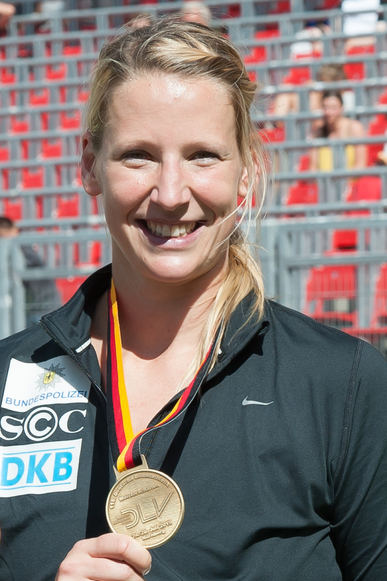 Deutsche Leichtathletik-Meisterschaften 2015: Frauen Diskuswurf - Julia Fischer, SCC Berlin